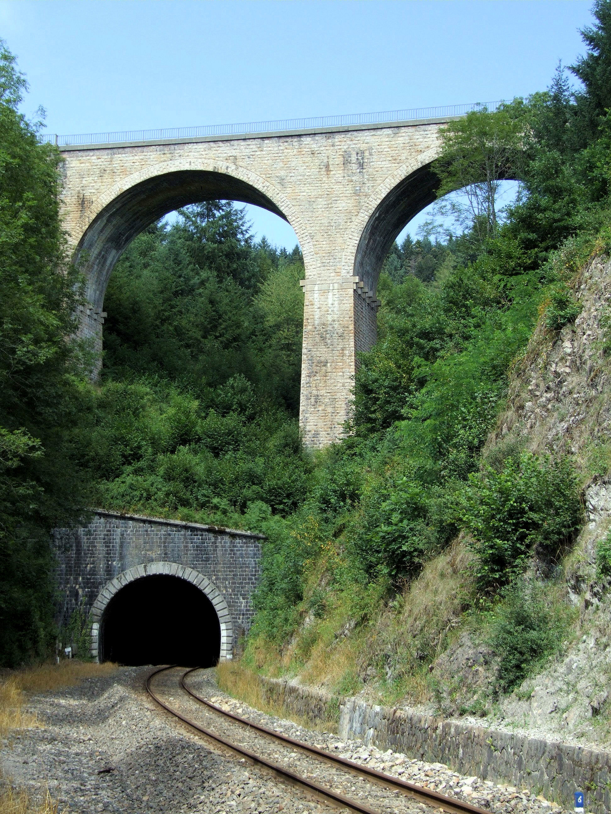 Boucle de Claveisolles : la sortie du tunnel au-dessous du viaduc ferroviaire de Saint-Nizier-d'Azergues